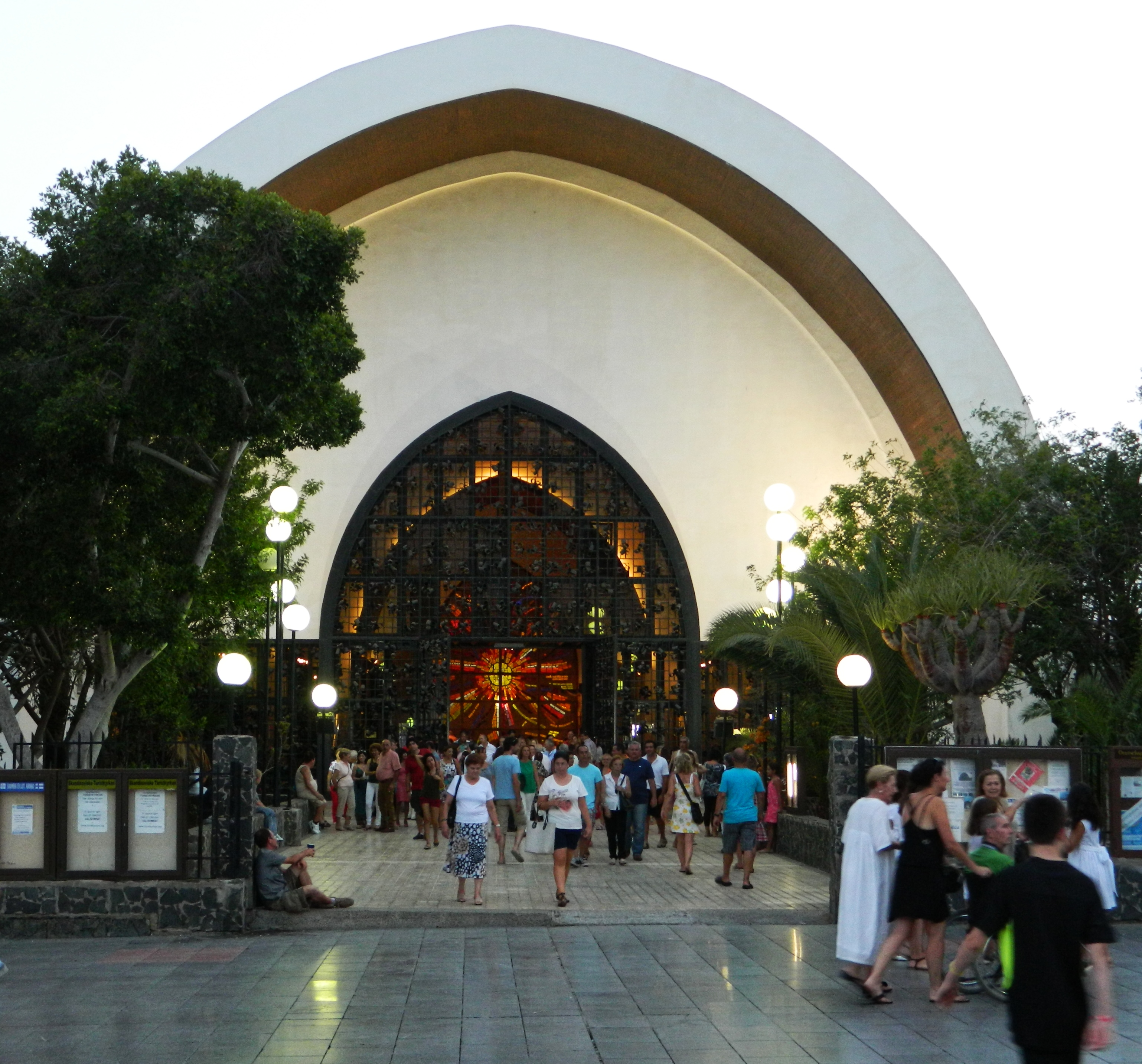 Messe ist zu Ende